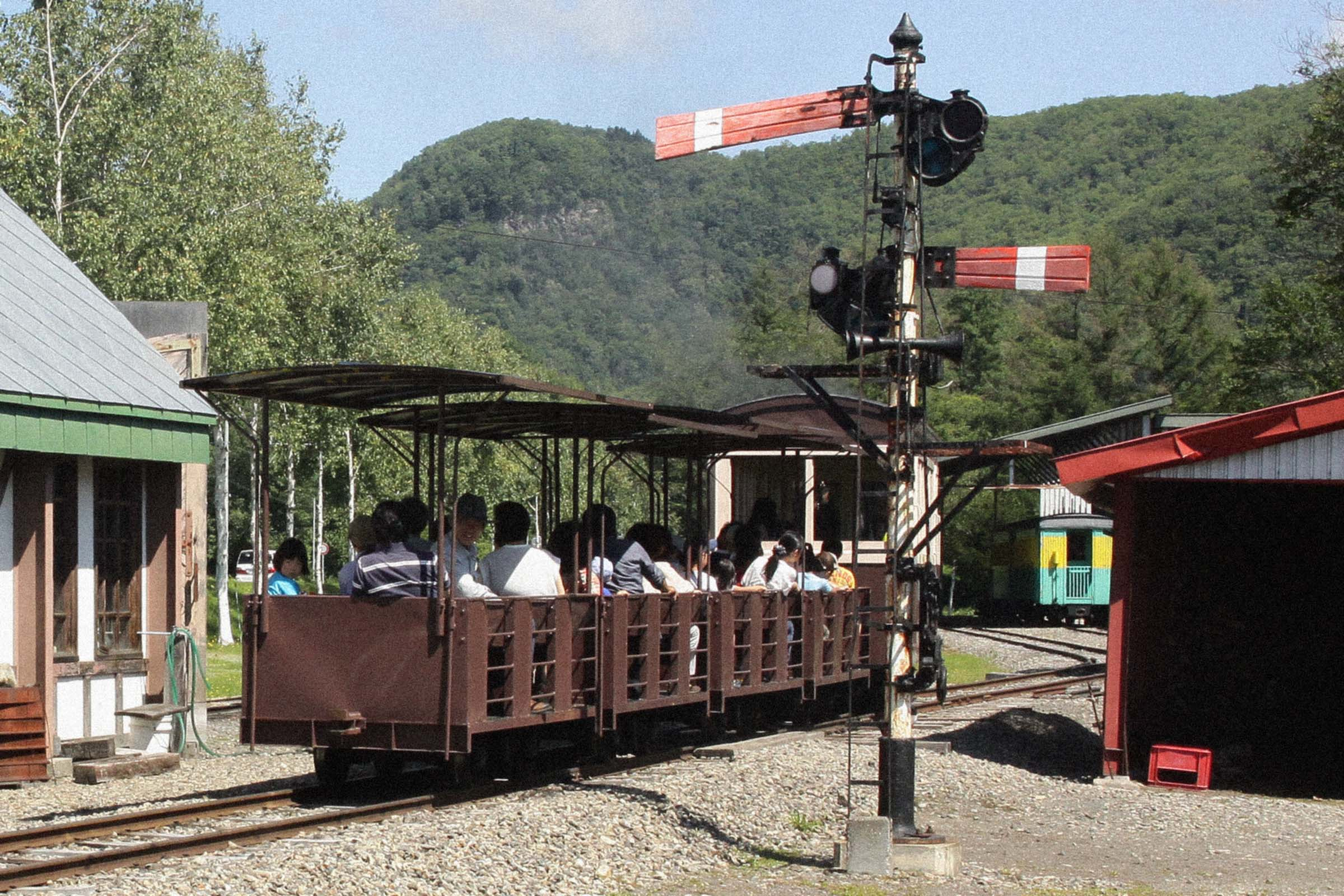 丸瀬布森林公園いこいの森（北海道遠軽町）園内軌道の開放型客車